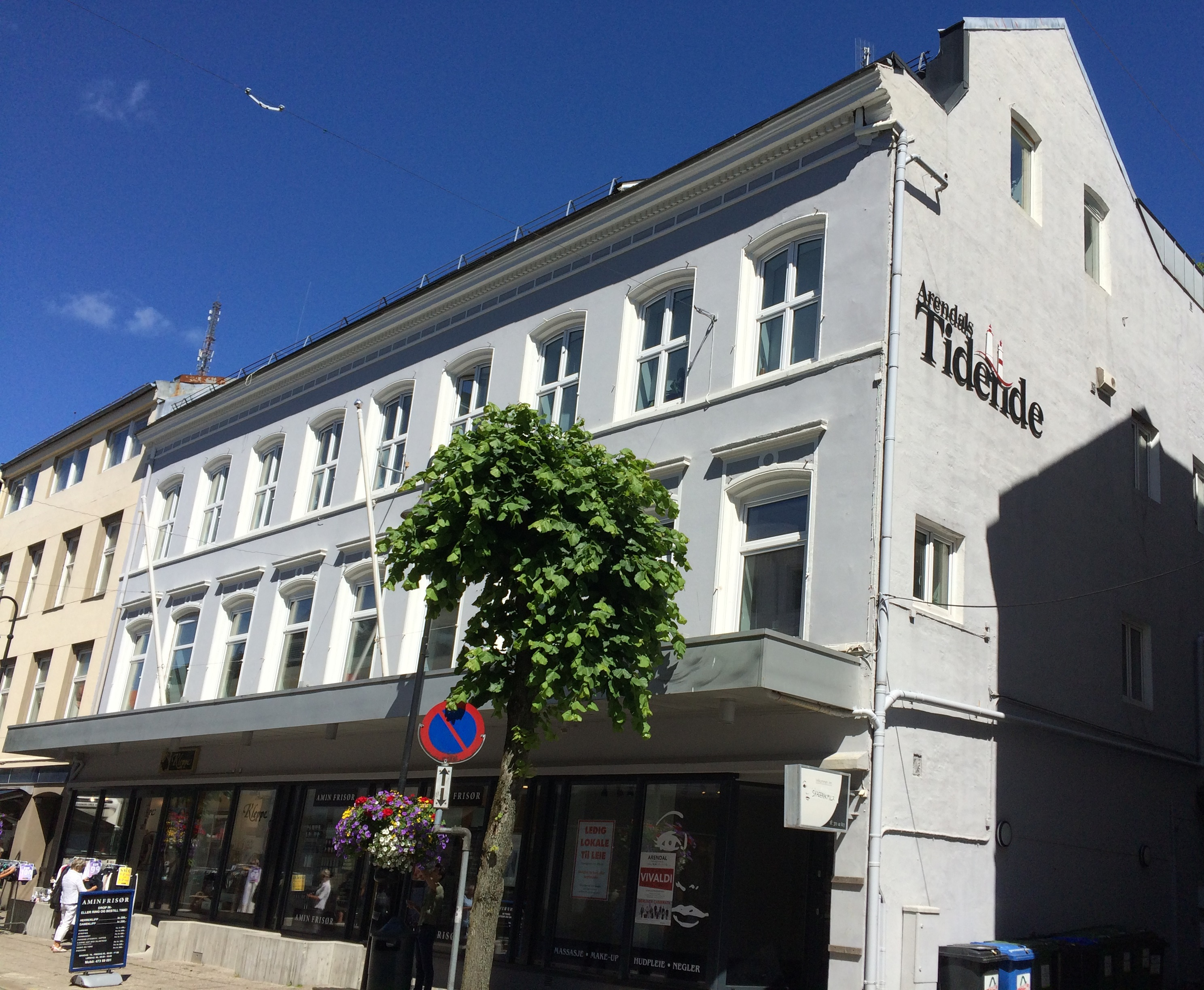 Arendal Tidendes lokaler i Havnegaten i Arendal sentrum